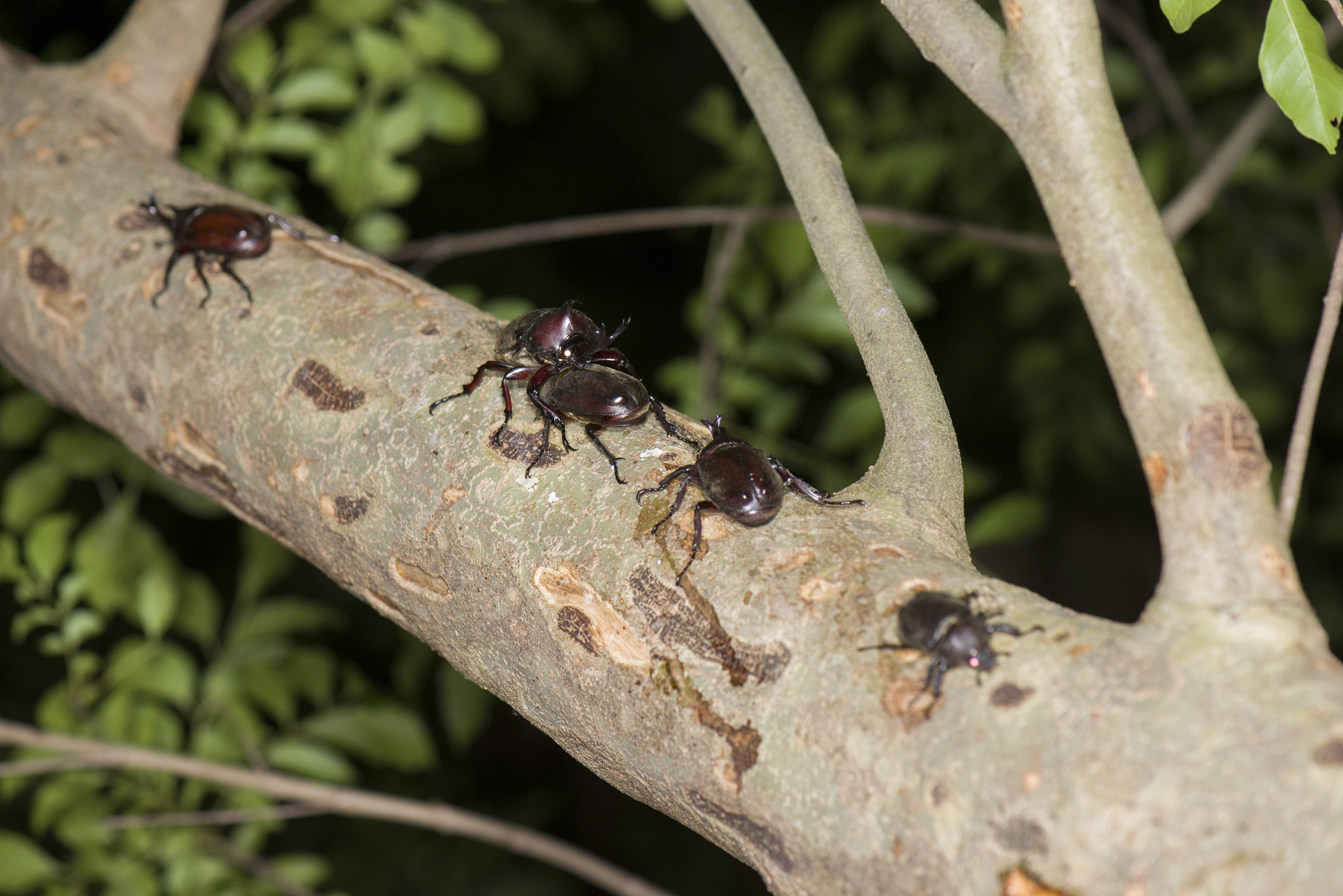 _ESJ0023 Allomyrina dichotomus